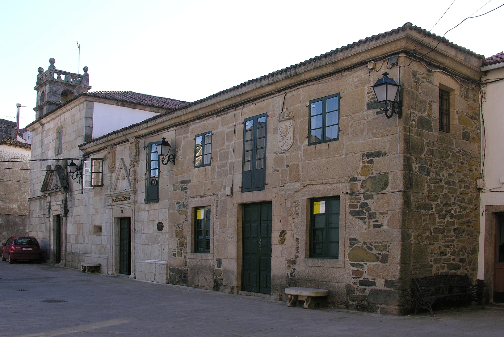 Casa do concello de Melide, Galiza.